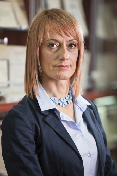 Српски (ћирилица): проф. др Сања Радовановић